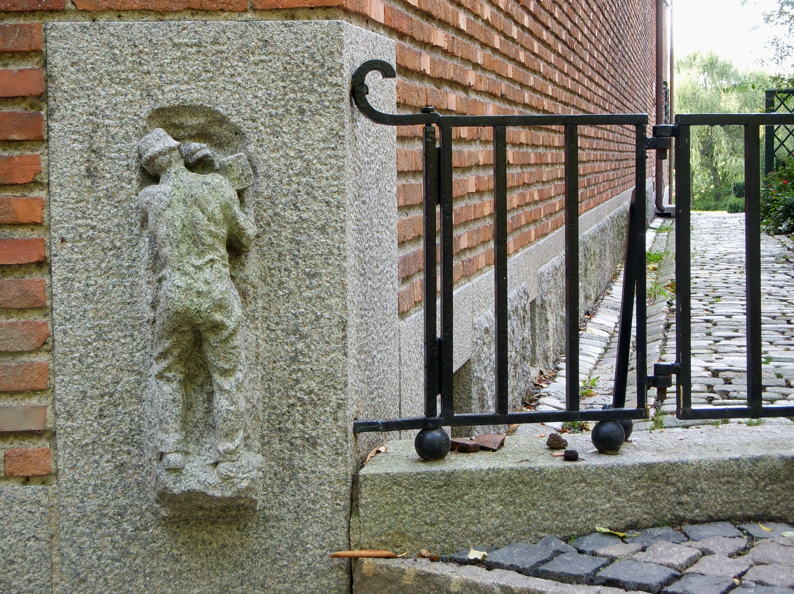 "Villa Geber" i Diplomatstaden, Stockholm, detalj sockel